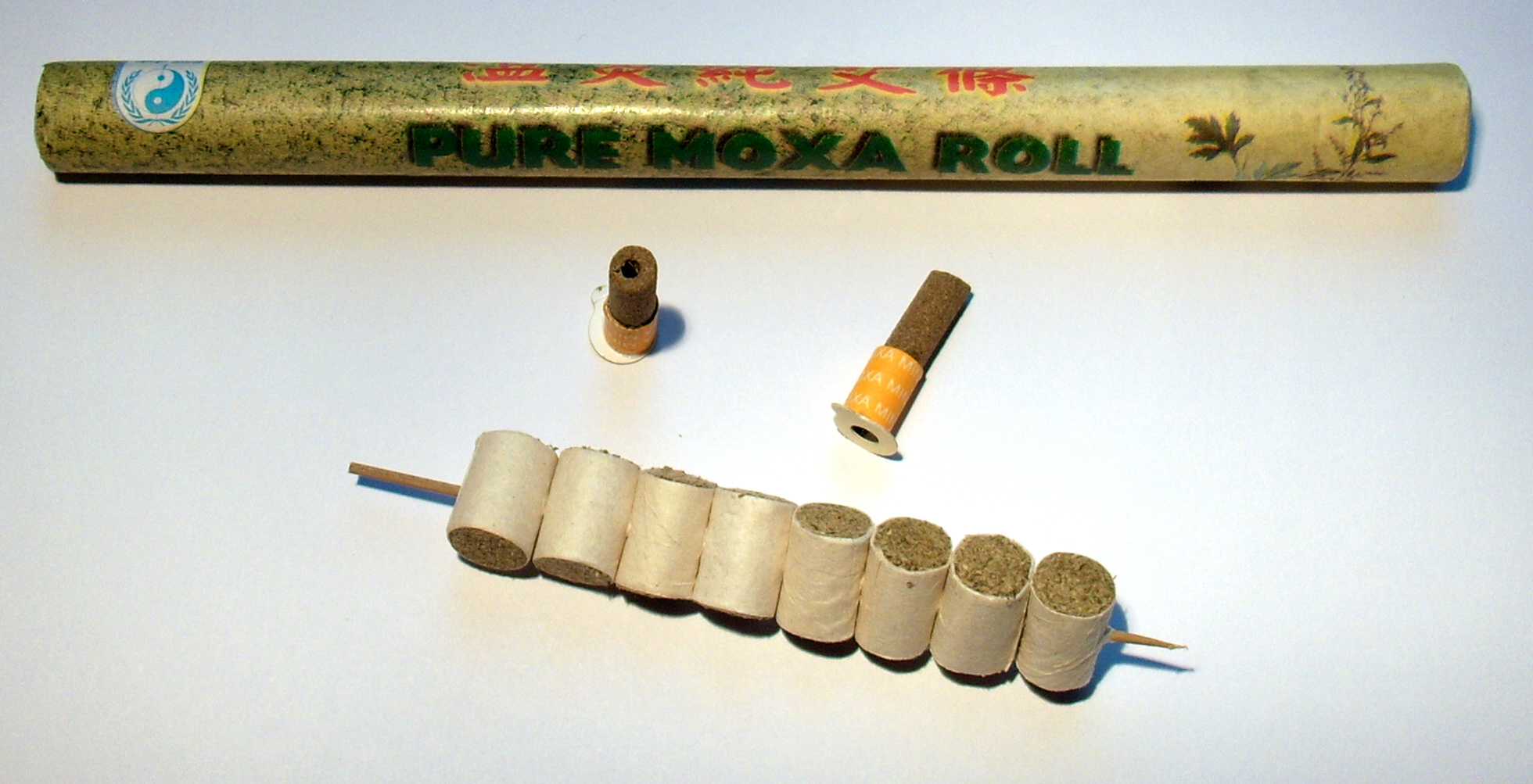 Moxa-Roll, Moxa-Hütchen, Moxa-Hütchen selbstklebend